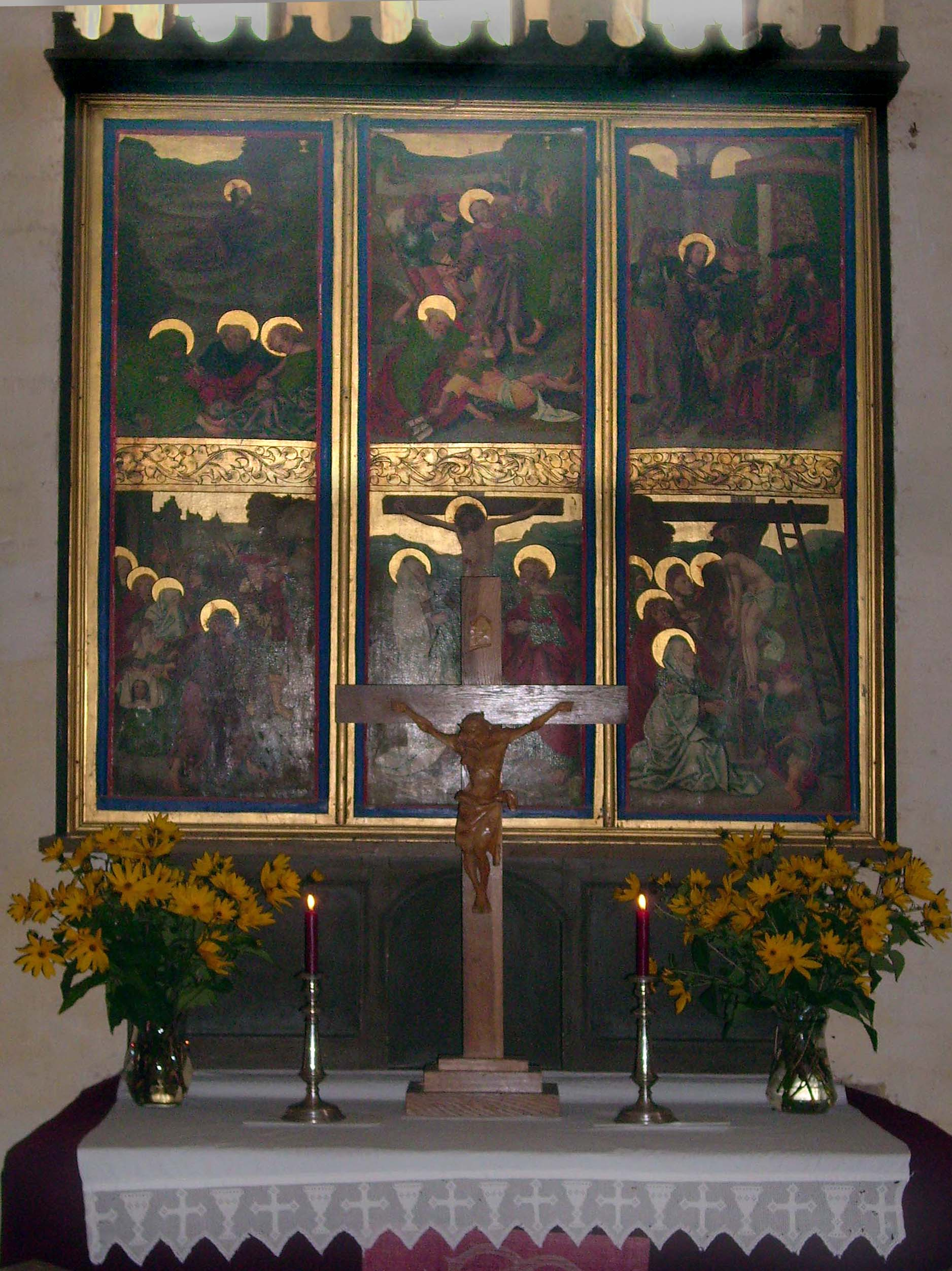 Dorfkirche Dahmen Altar